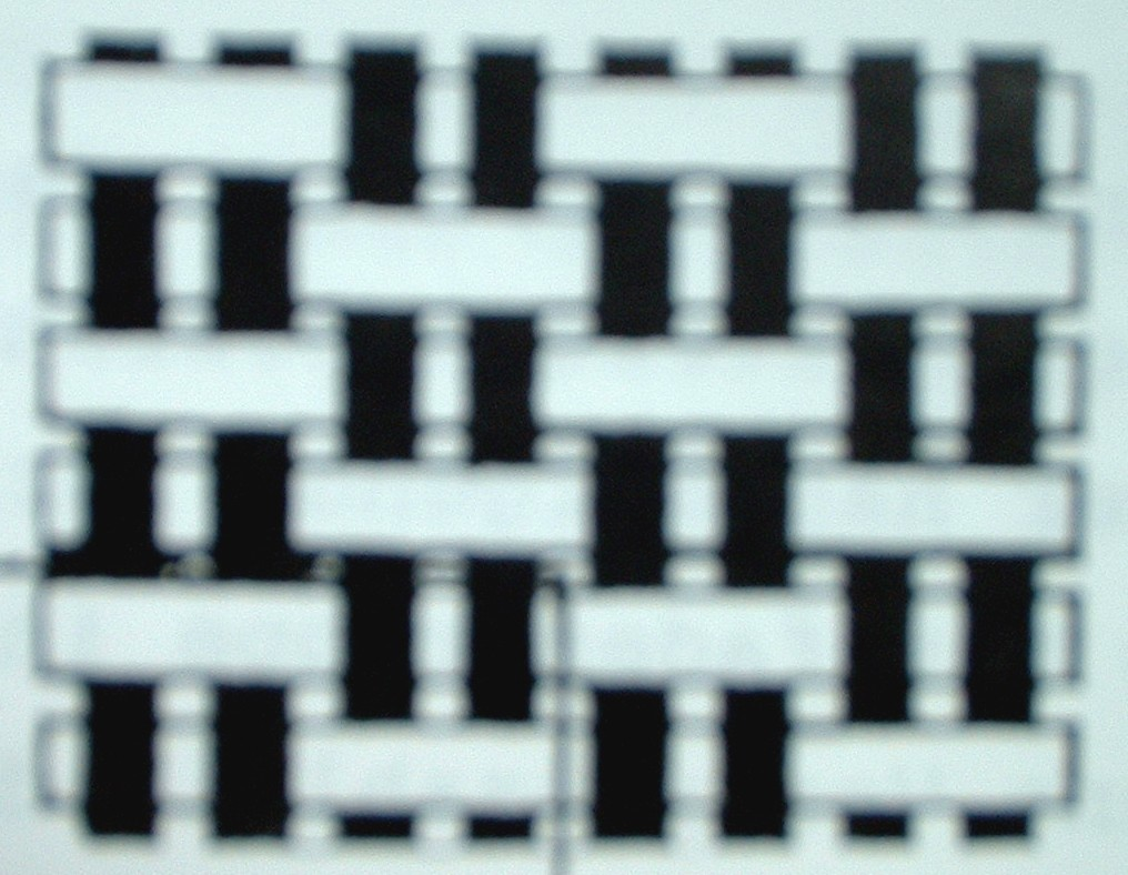 Bindungsstruktur: Längsrips